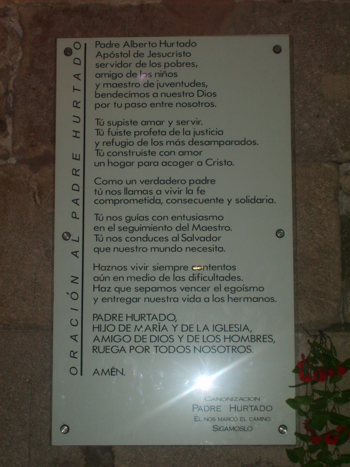 Oración al Padre Hurtado.